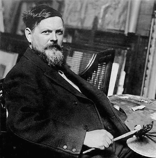 Frank Brangwyn, Welsh Artist Painter